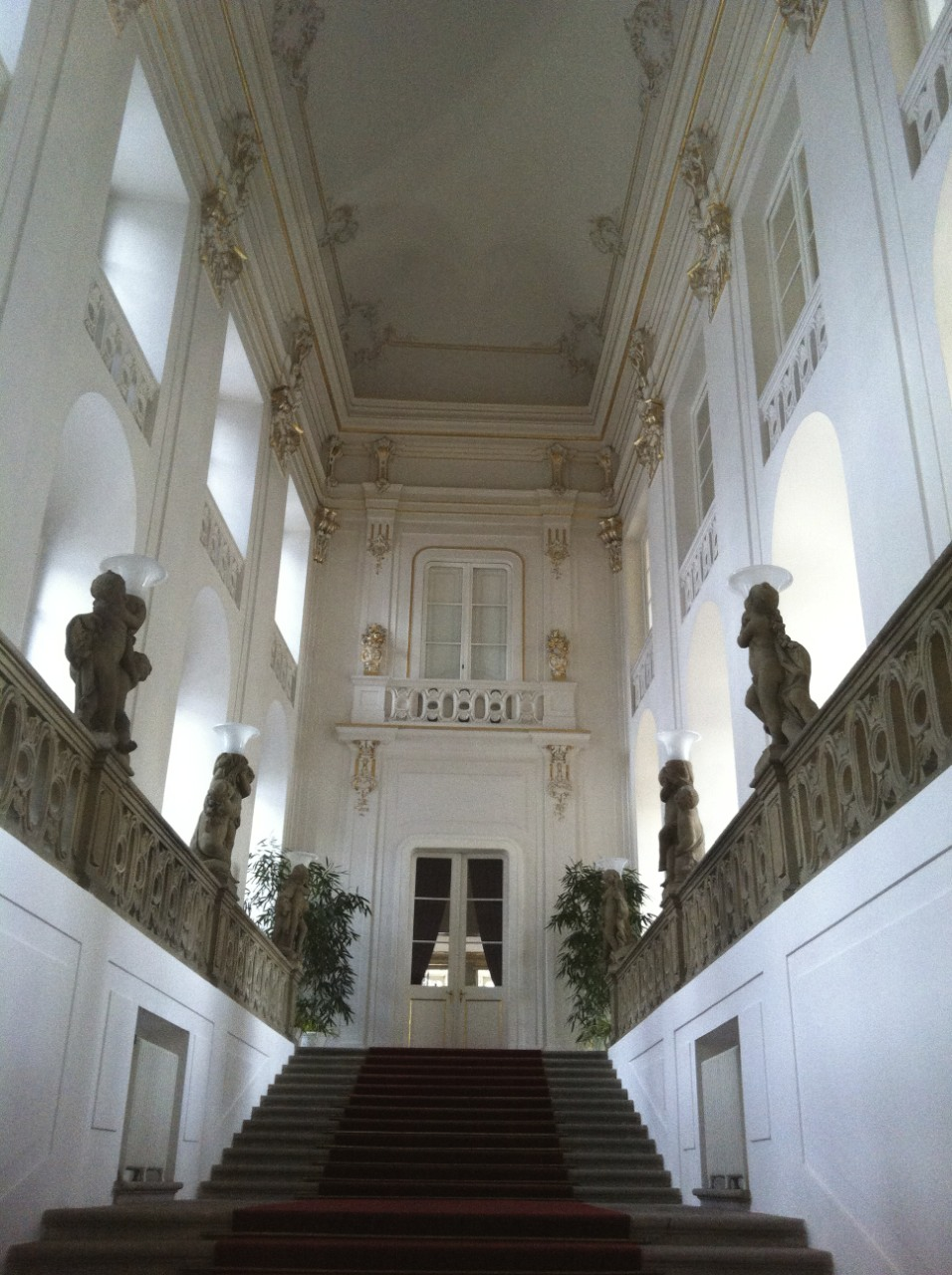 Vstup do západního křídla Pražského hradu od N. Pacassiho.